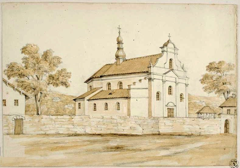 Шаргород костел Наполеон Орда